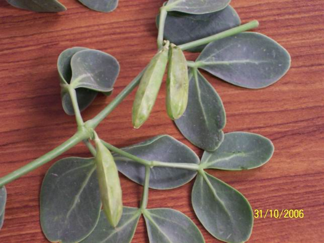 Zygophyllum fabago